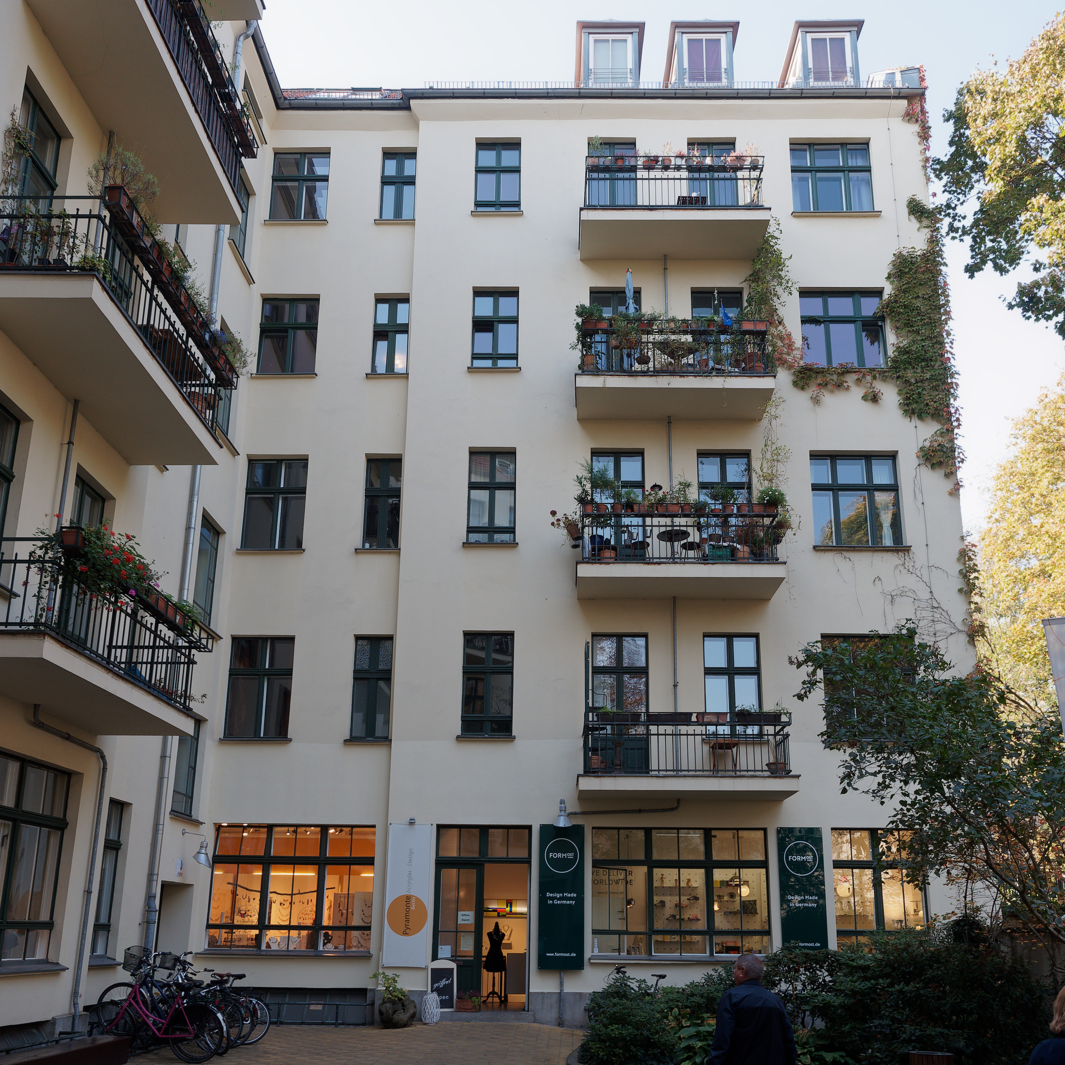 Berlin Hackesche Höfe, Hof VIII, Blick nach WThis is a photograph of an architectural monument.